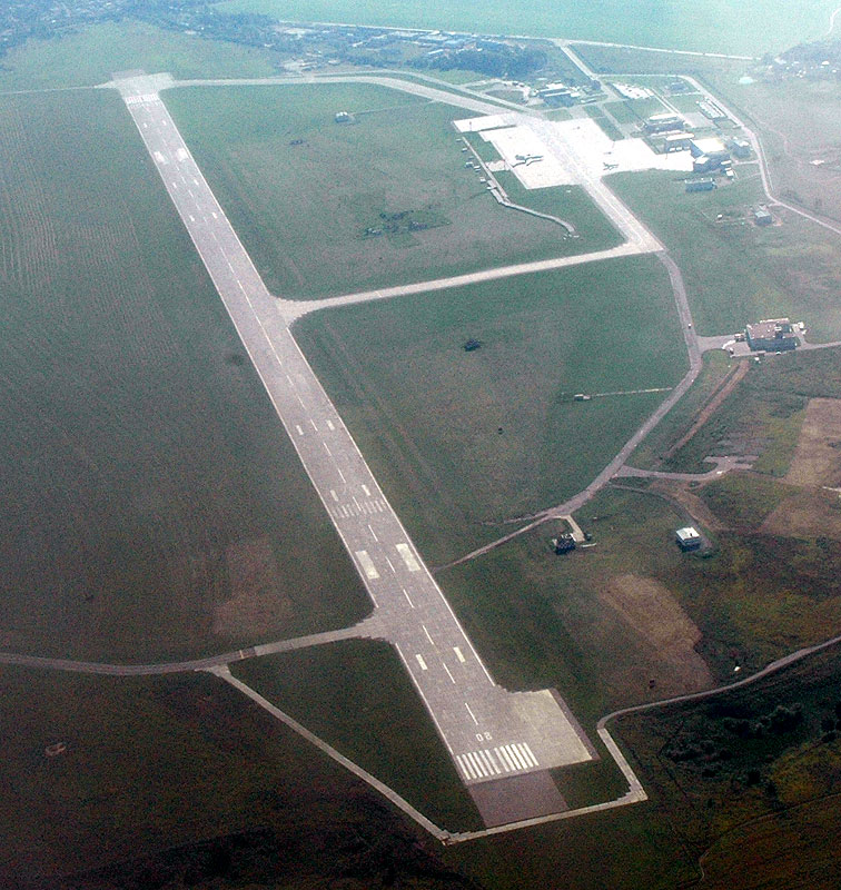 FlughafenOstafiewo